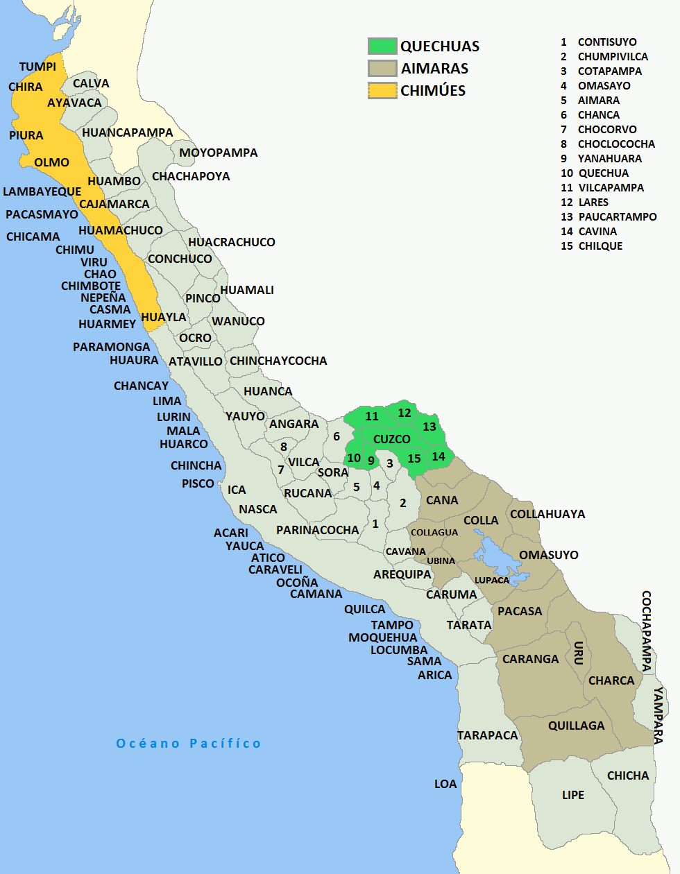 Naciones integrantes del Tahuantinsuyo correspondientes a los actuales paises de Perú y Bolivia durante el Gobierno de Atahualpa.